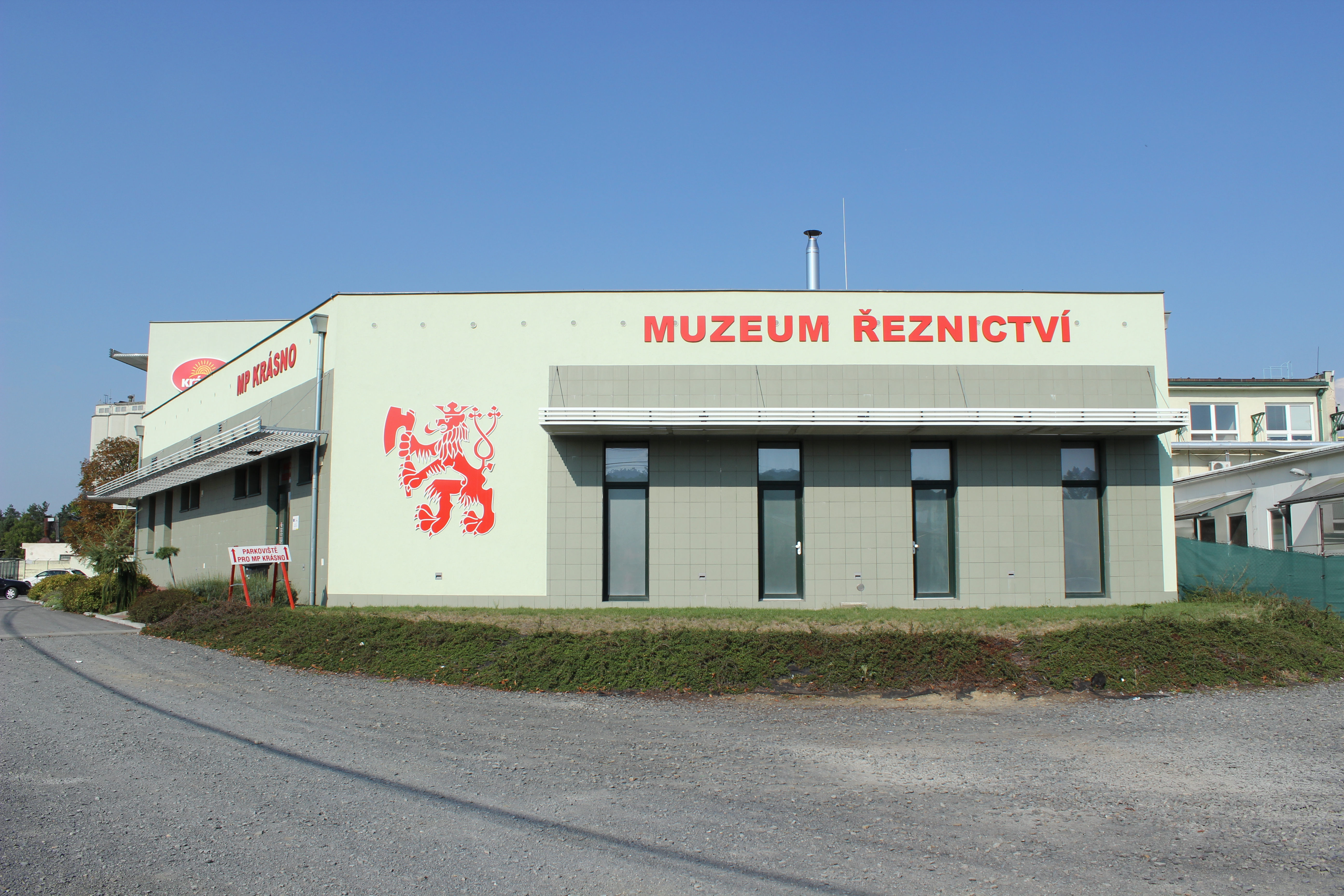 Objekt Muzea řeznictví v masozávodu Krásno ve Valašském Meziříčí.